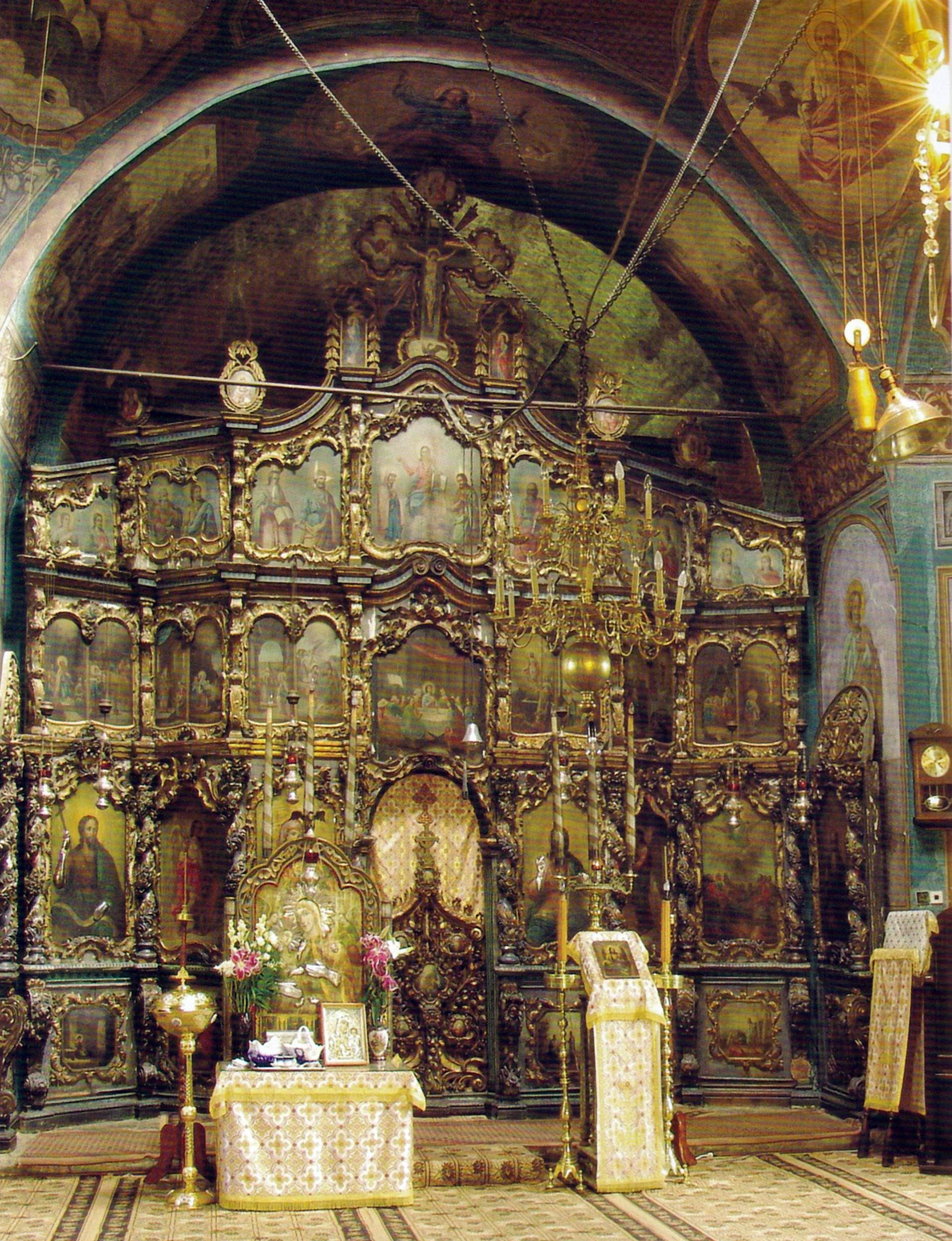 Nicolae Grigorescu - Manastirea Zamfira